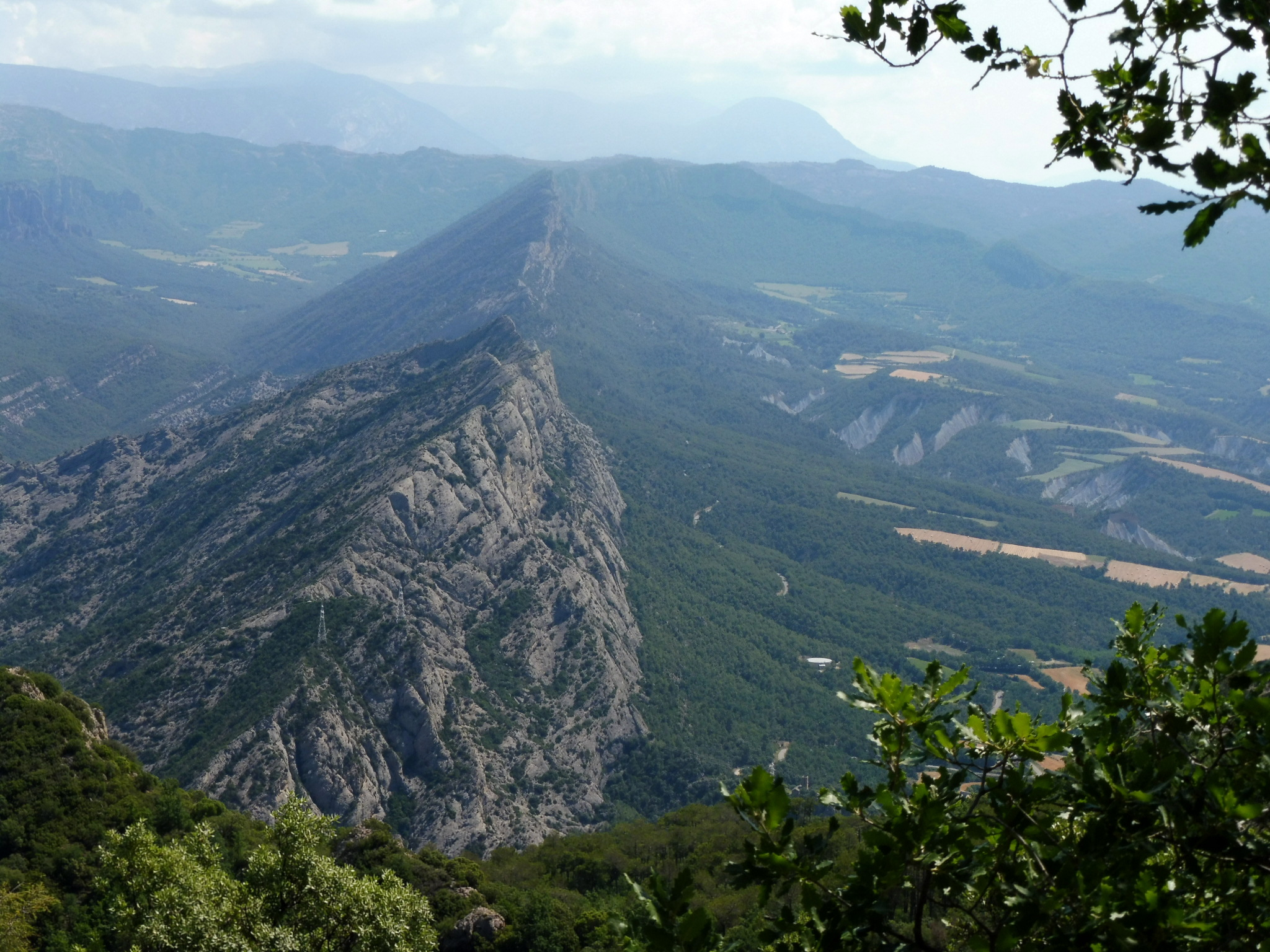 Serra de les Canals, flanc nord de l'anticlinal d'Oliana This is a a photo of a geologic site or geotope in Catalonia, Spain, with id: IEIGC-126